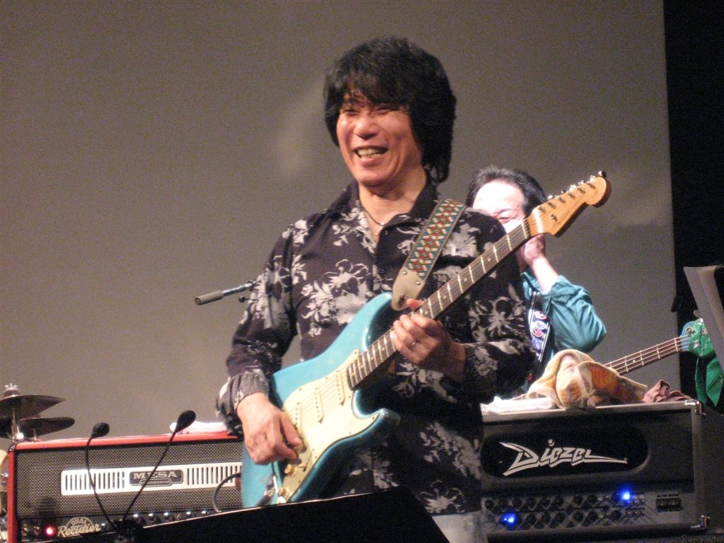 2015.07.26 Guitar☆Man Live＠東京キネマ倶楽部